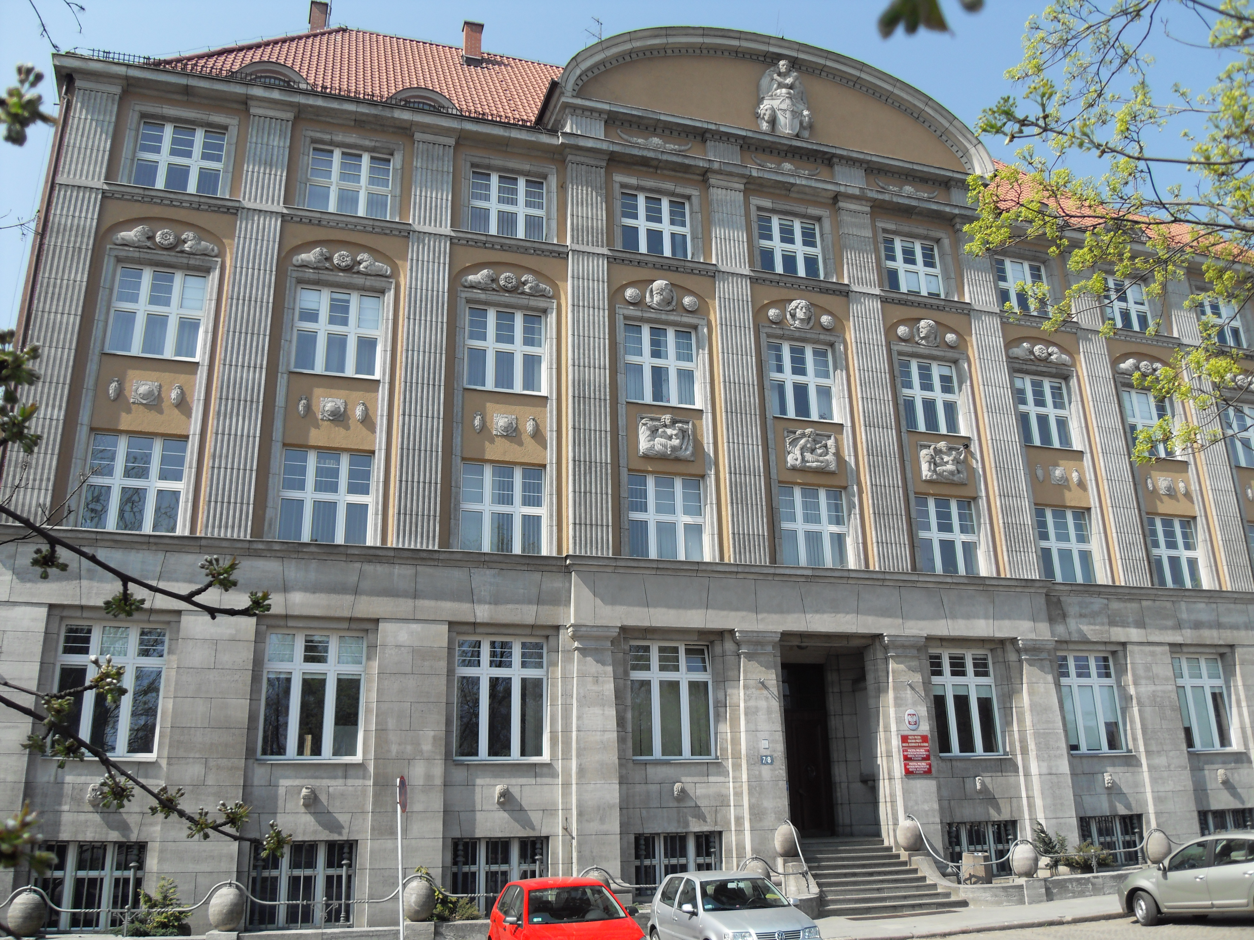 Gdańsk Śródmieście, Targ Rakowy 7/8.